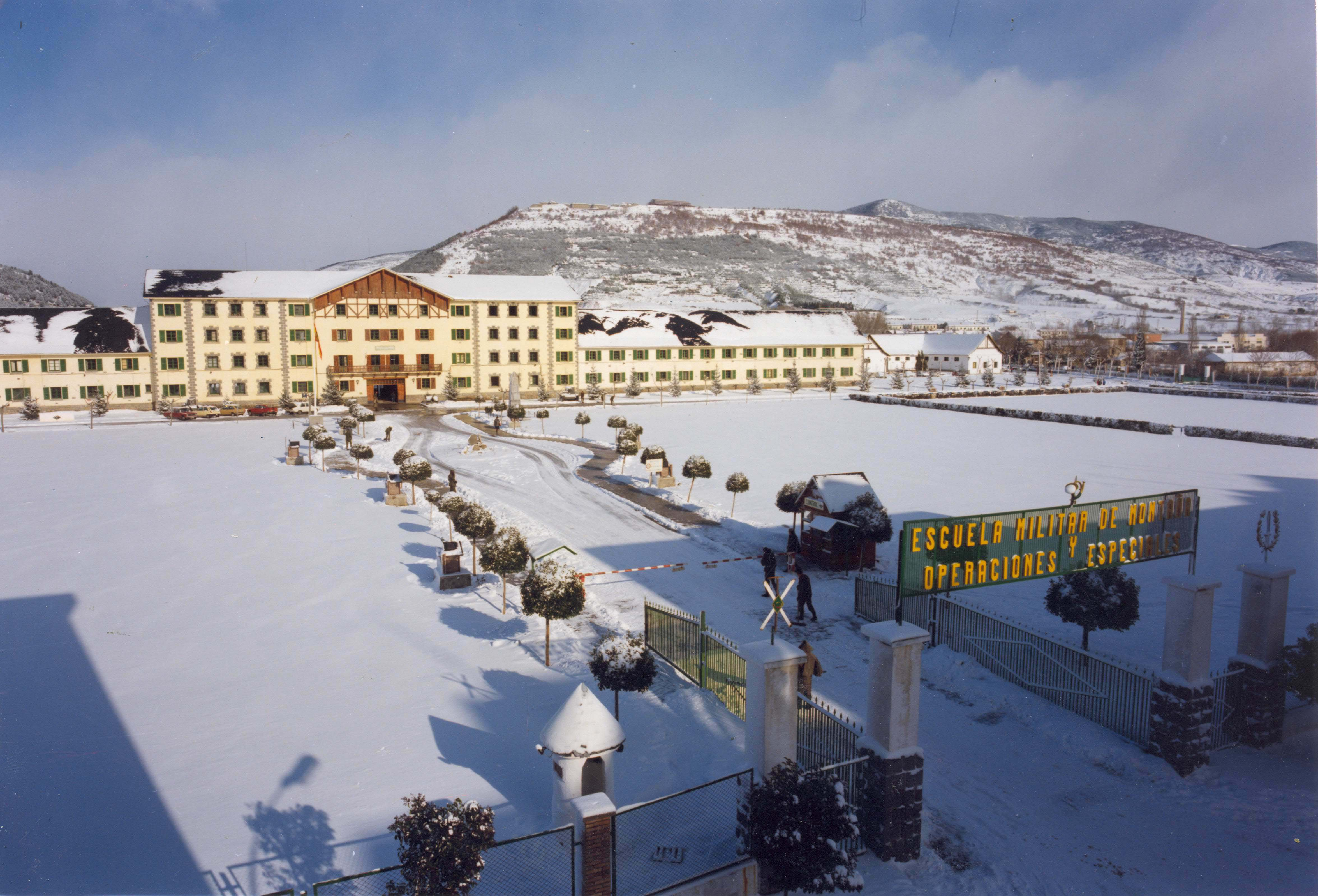 Foto EMMOE nevada